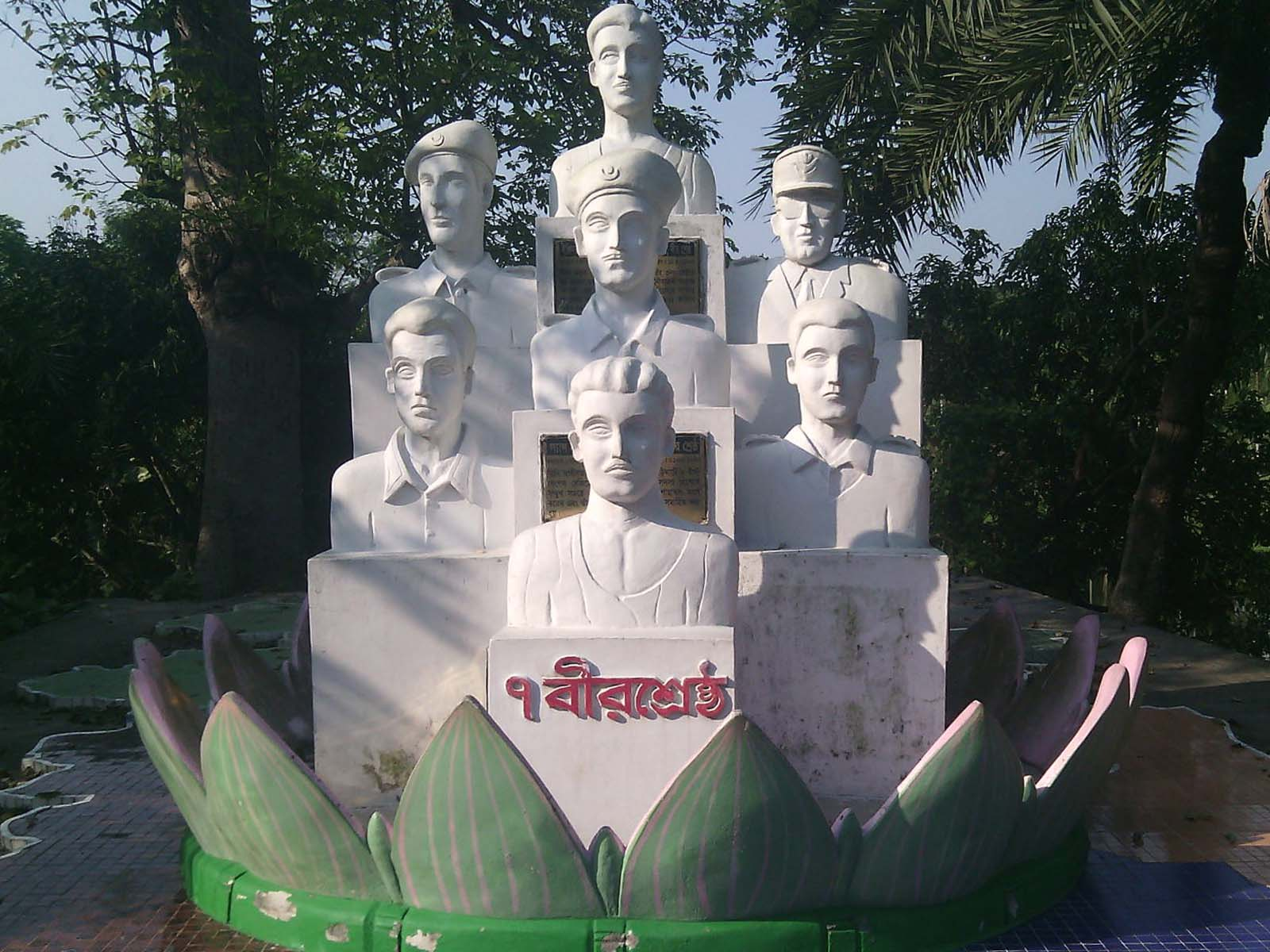 ছবিটি যশোরের বিনোদিয়া পার্ক থেকে ১৯শে অক্টোবর ২০১৪ তারিখে ক্যামেরা বন্দী করা। এই ছবিটিতে আমরা দেখতে পাচ্ছি কংক্রিটের তৈরি বাংলাদেশের ৭ বীরশ্রেষ্ঠকে। ১৯৭১ সালে যুদ্ধের সময় যারা নিশ্চিত মৃত্যু জেনেও পিছু হটেনি। এদেশ তাদেরকে গর্বভরে চিরদিন স্বরণ করবে। তারই ধারাবাহিকতায় চিরপরিচিত রাখতেই এই স্থাপনা।